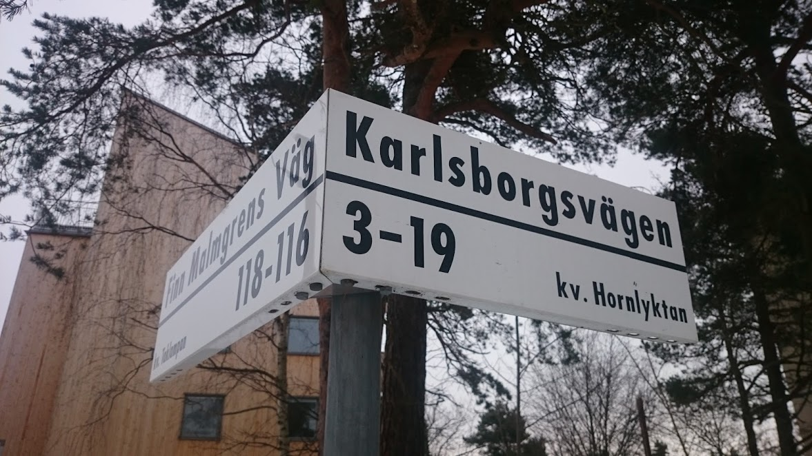 Skylt vid korsningen Finn Malmgrens väg / Karlsborgsvägen.